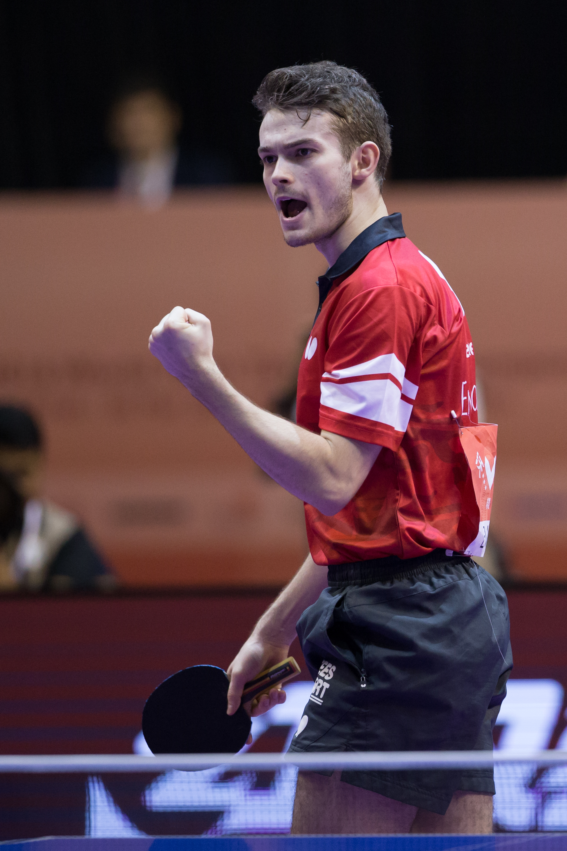 _K0K5910